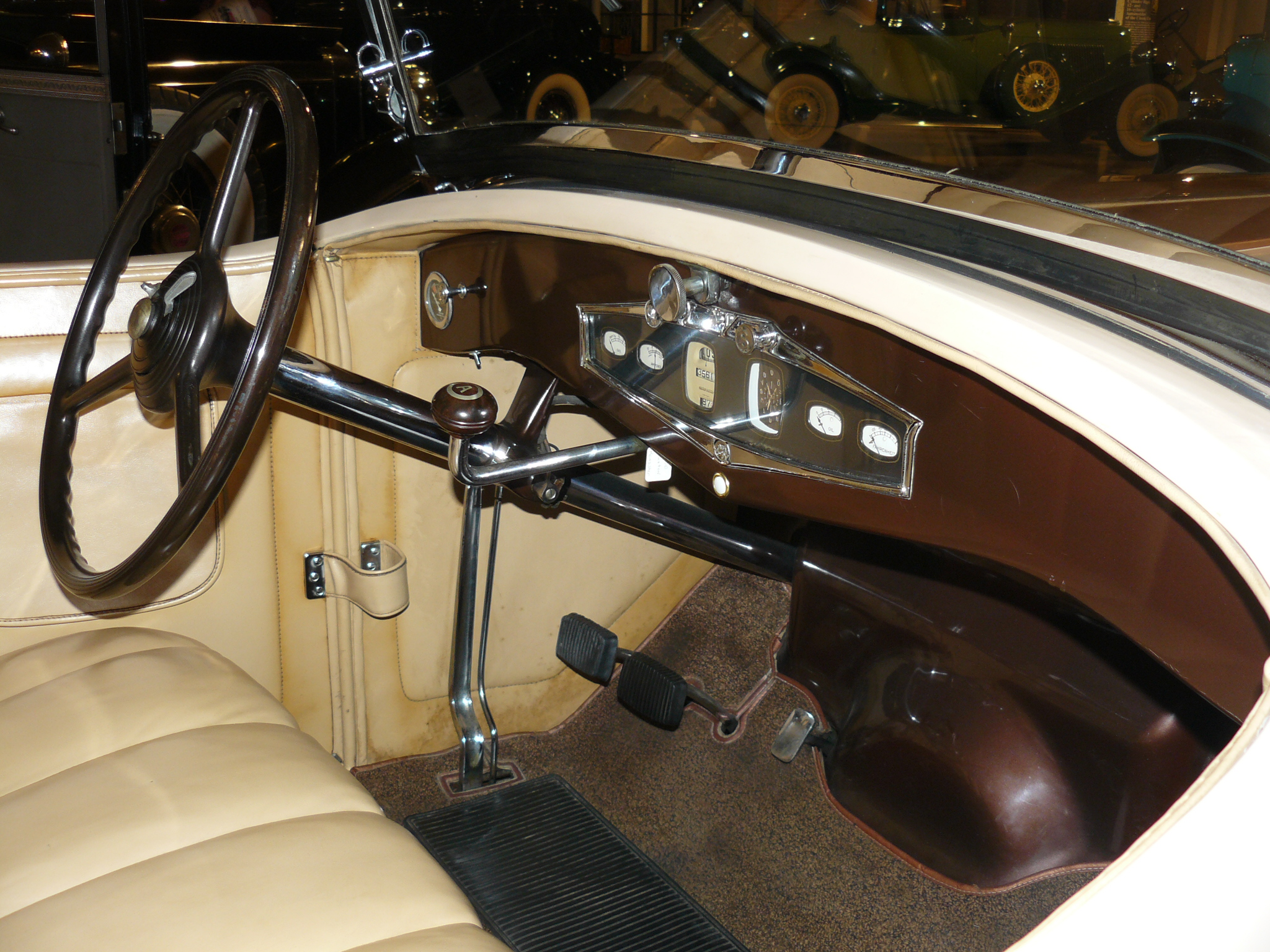 Auburn 2013